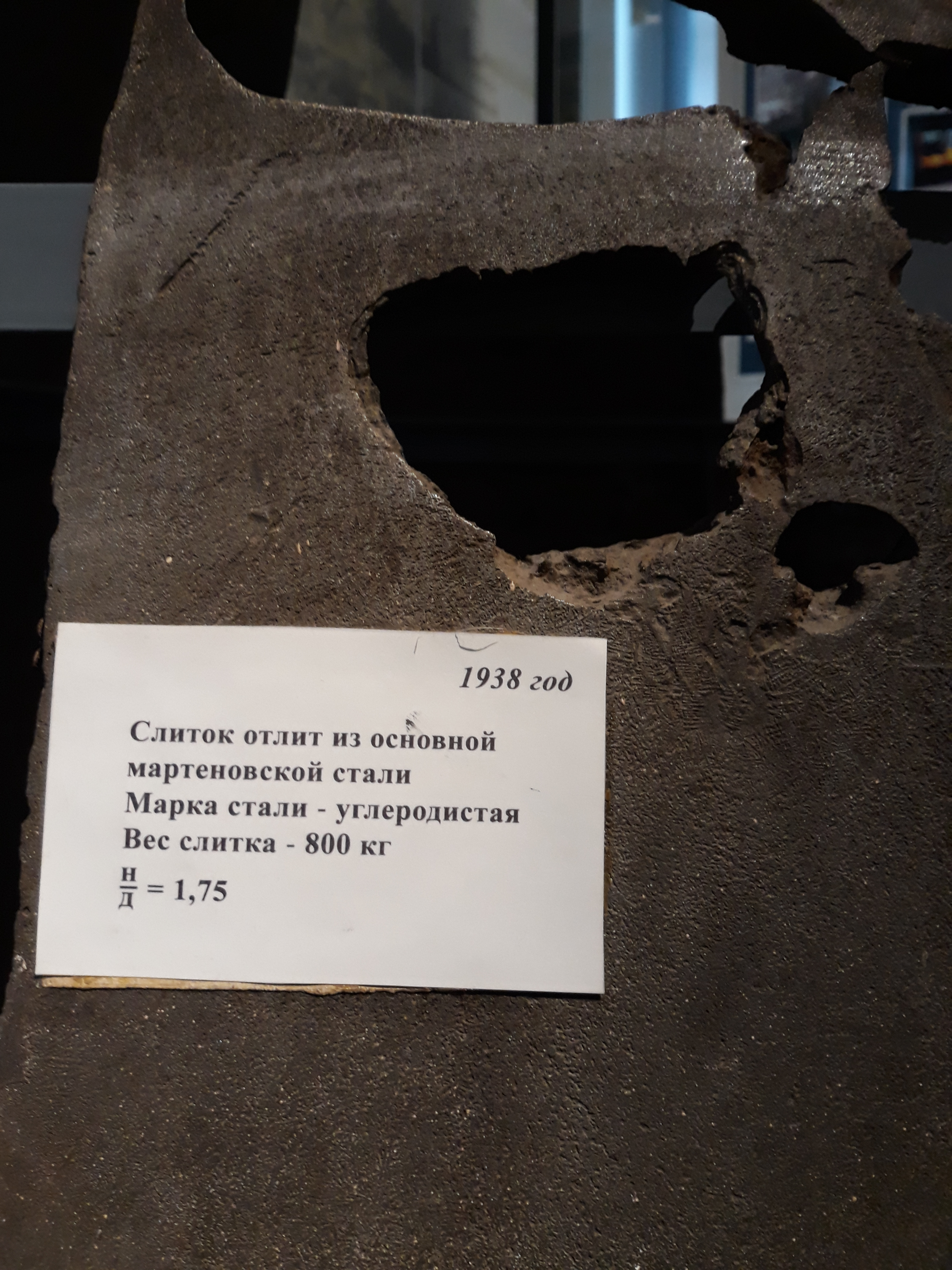 Музей Обуховского завода. 1938 год. Слиток отлит из основной мартеновской стали. Марка стали - углеродистая. Вес слитка 800 кг. Н/Д=1,75